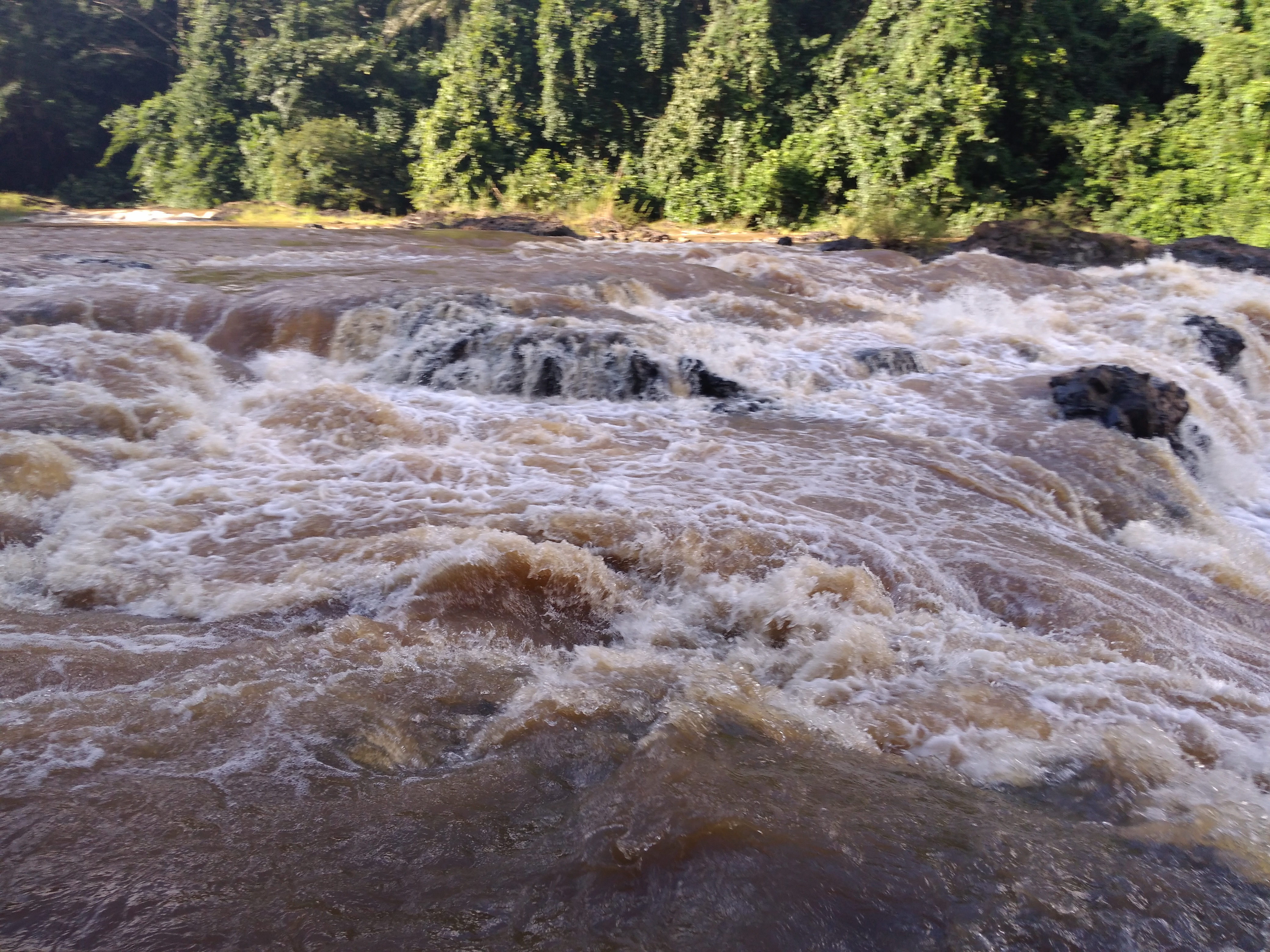 Chûtes-d-Ekom-Nkam. Cette image présente les chûtes d'Ekom-Nkam, situées à proximité de la ville de Melong , dans la région du Littoral